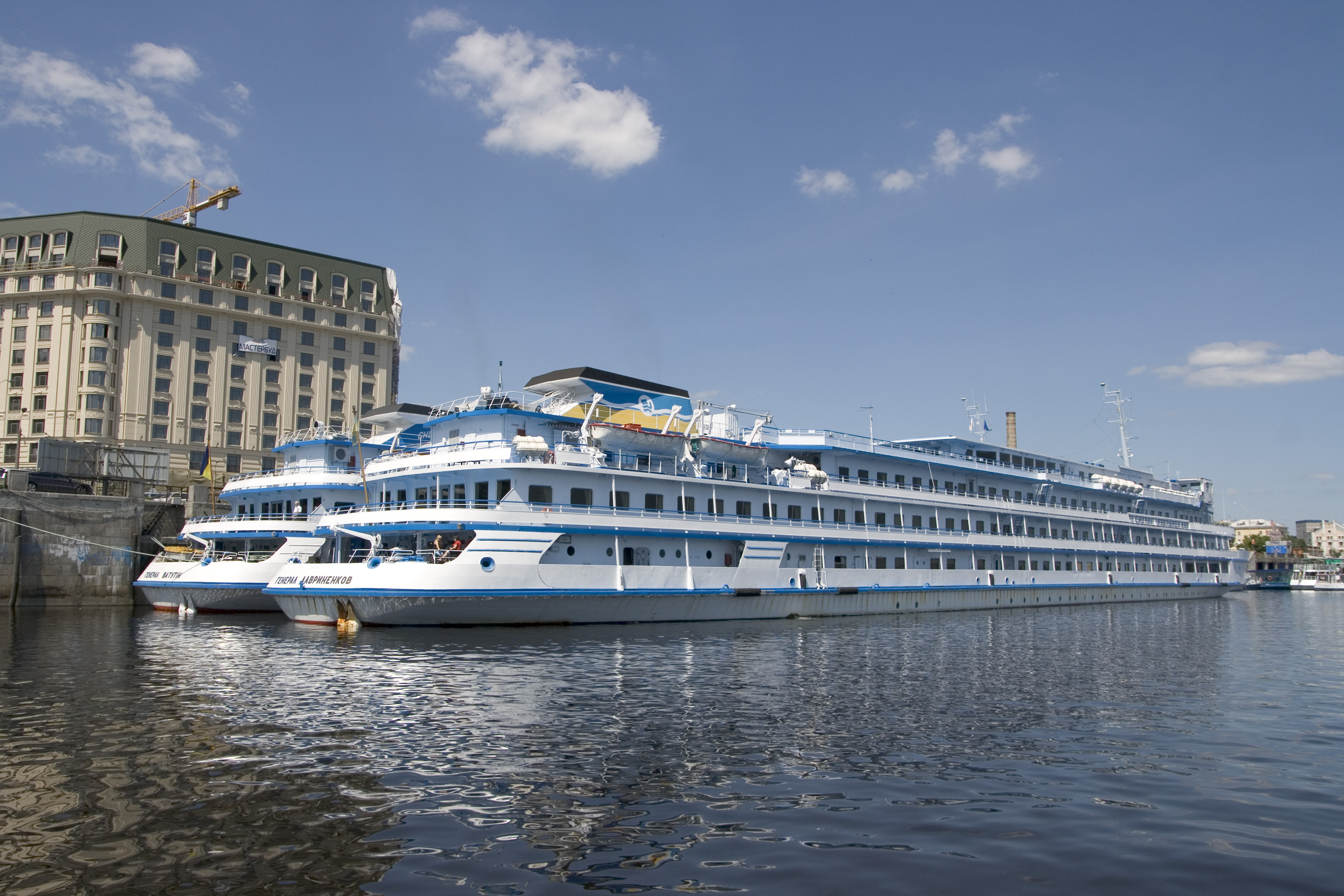 Podil's'kyi district, Kiev, Ukraine